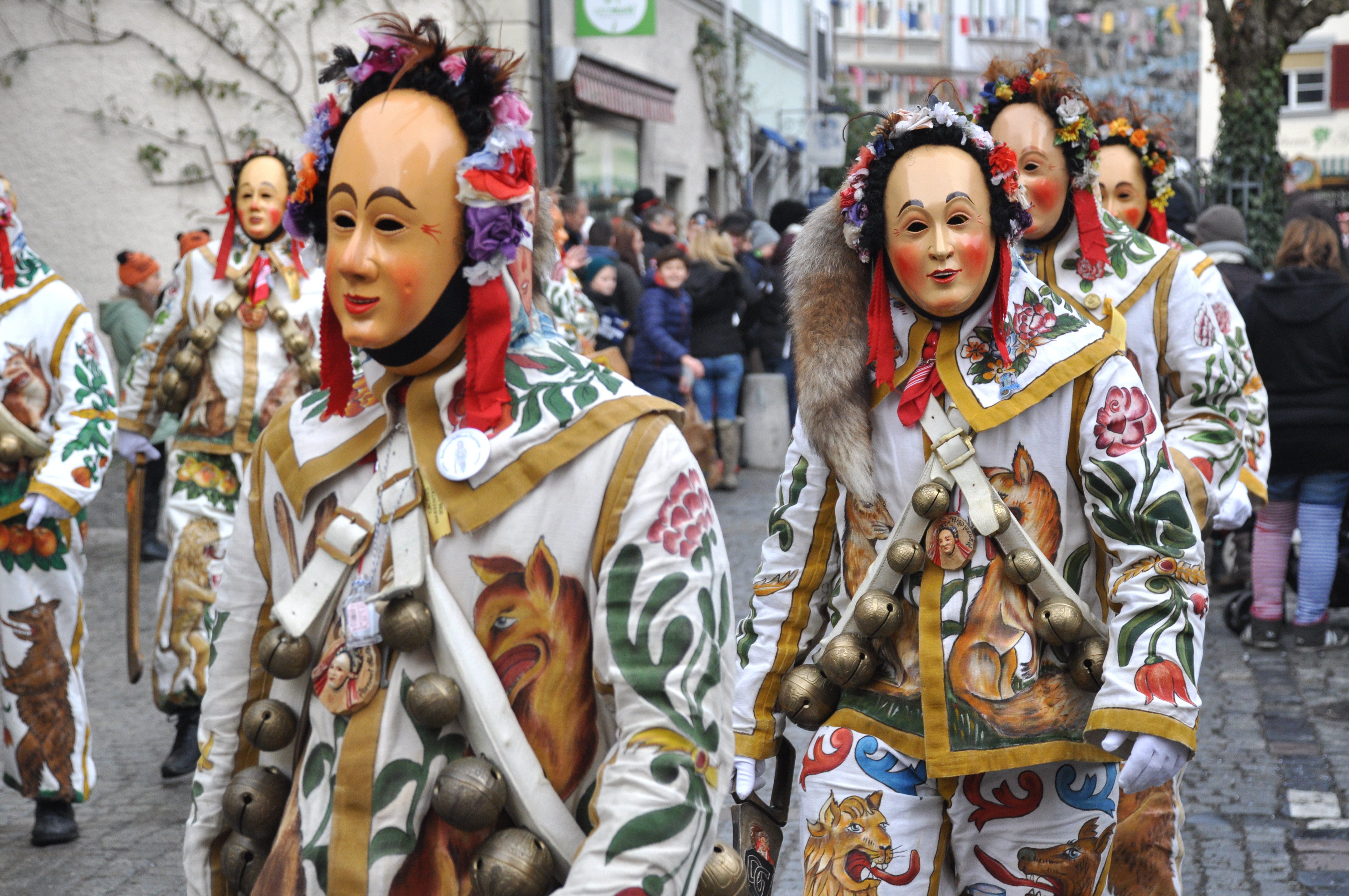 Narrenzunft Eintracht Bräunlingen; Narrenfigur: Stadthansel Fotografiert beim Großen Narrentreffen der Vereinigung Schwäbisch-Alemannischer Narrenzünfte (VSAN) in Lindau; Narrensprung am Sonntag, 24. Januar 2016.